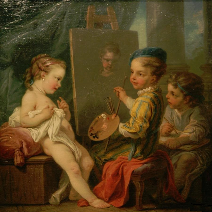 La Peinturelabel QS:Lfr,"La Peinture"